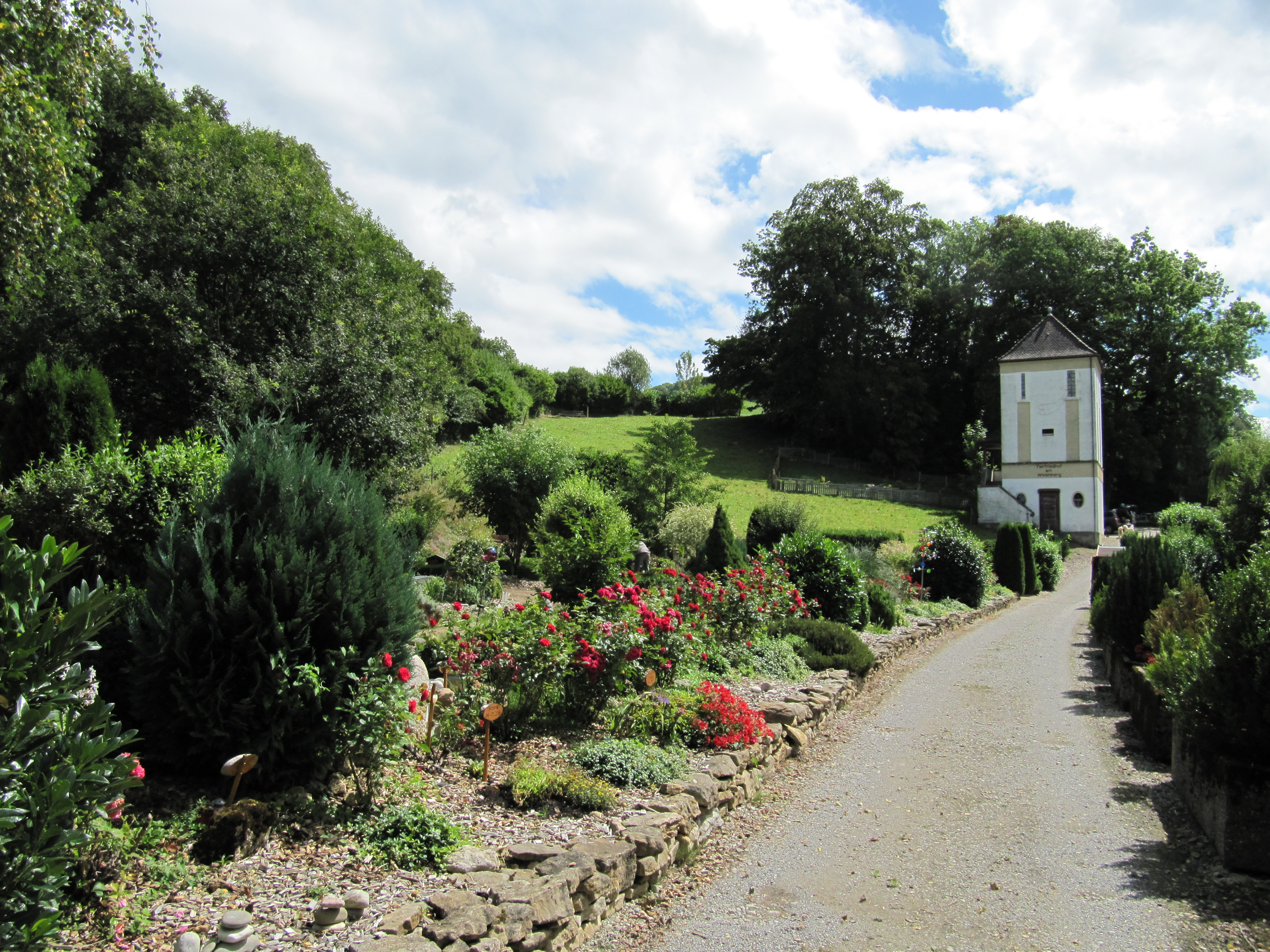 Tierfriedhof am Wisenberg, Läufelfingen BL, erster Tierfriedhof der Schweiz (2001 gegründet), Grabfeld, Trockenmauer, altes Transformatorenhaus mit Turmstübli/Aufbahrungsraum